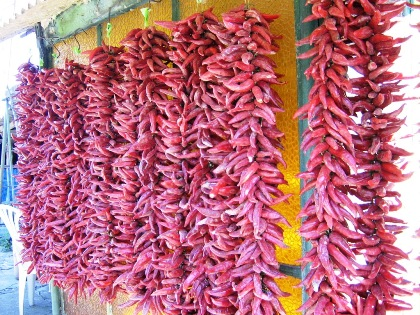 Paprikafüzér (Bogyiszló)